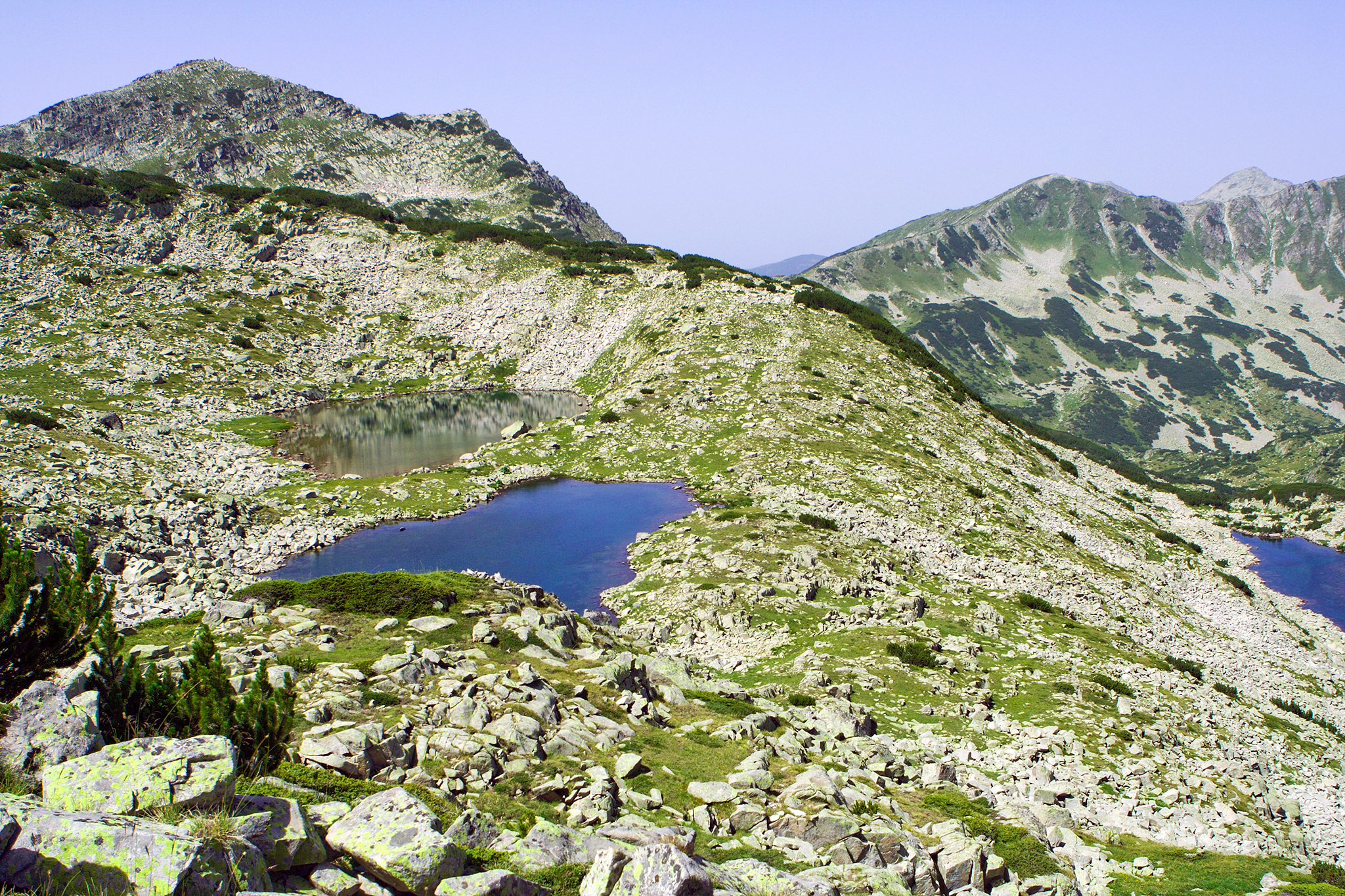 Две от Валявишките езера под в. Дженгал. На заден план вляво - в. Валявишки чукар